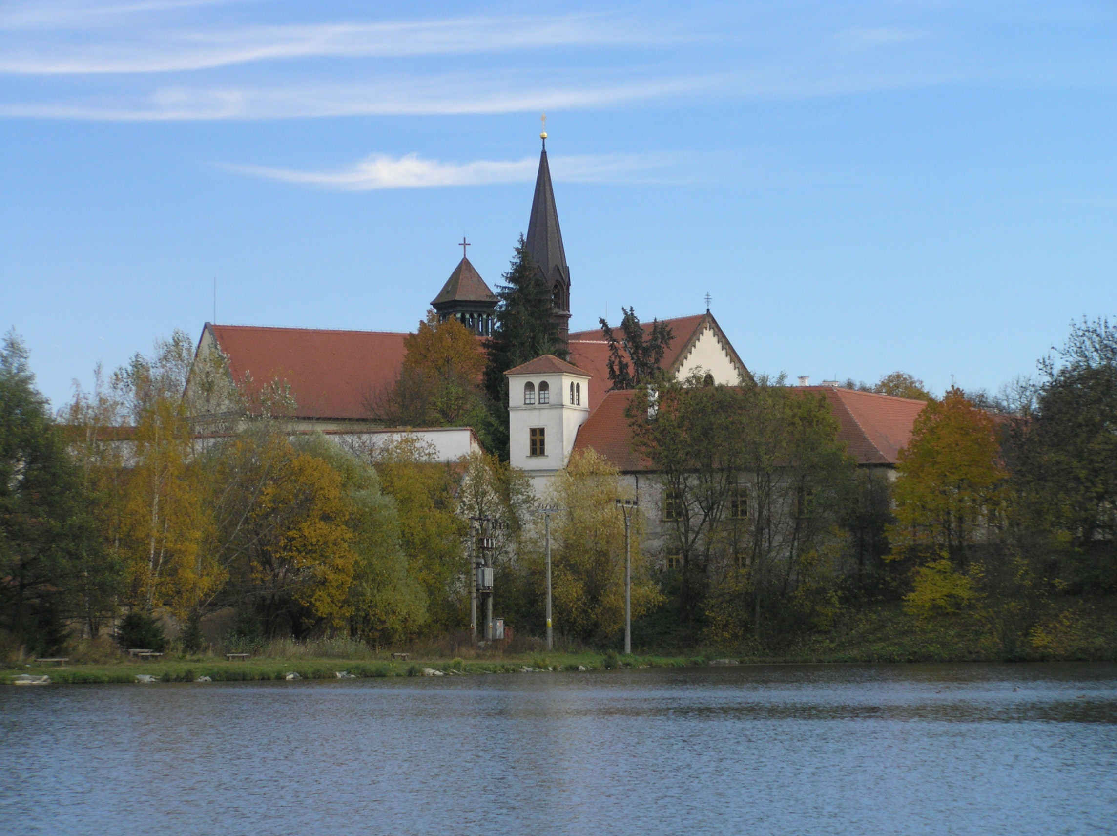 Klášter Porta Coeli v Předklášteří u Tišnova